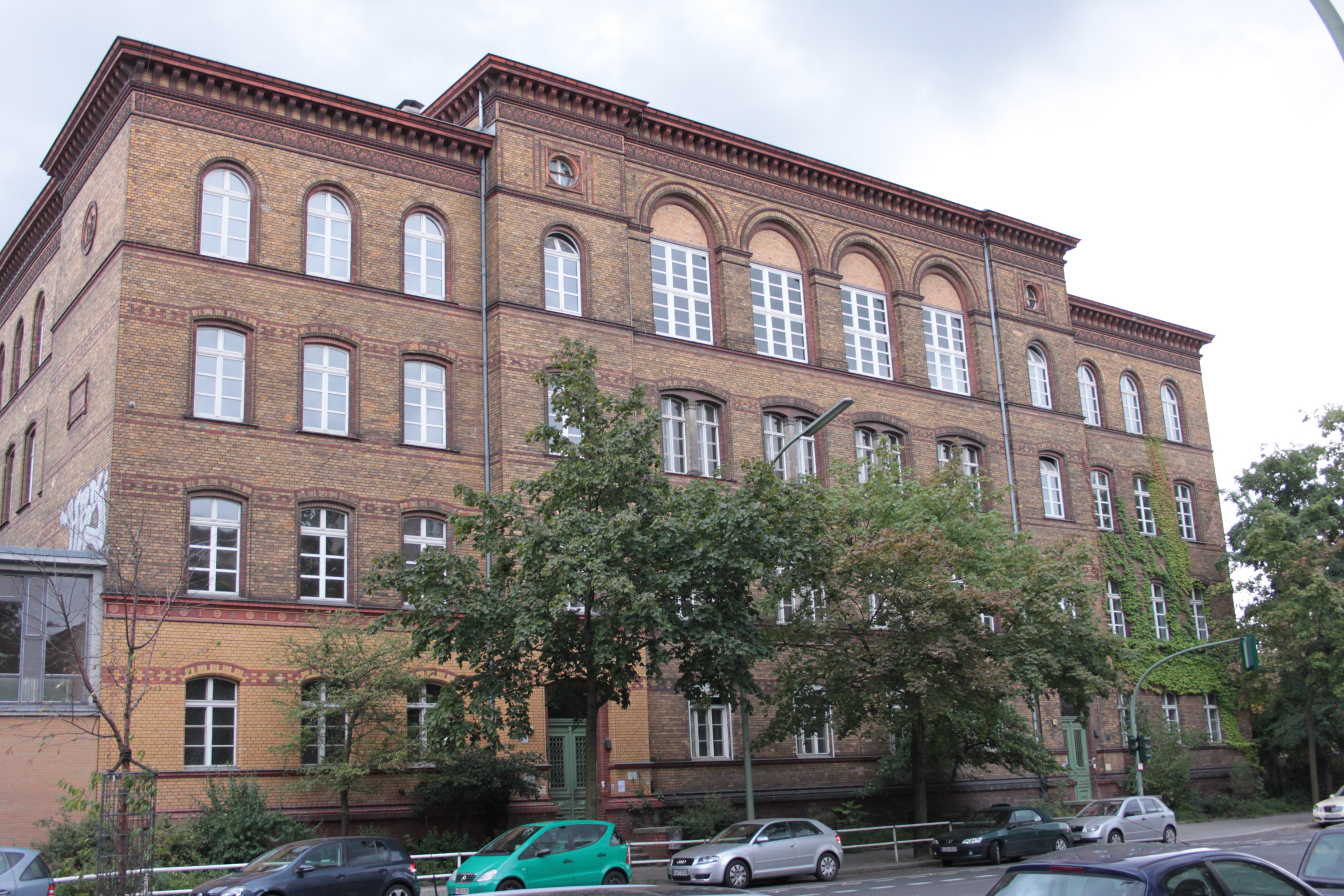 113. und 128. Gemeindeschule, Berlin Moabit, Turmstraße 86, 1881/1882 von Hermann Blankenstein, Erweiterungsbau 1960–1962 vom Hochbauamt Tiergarten, Denkmalnummer